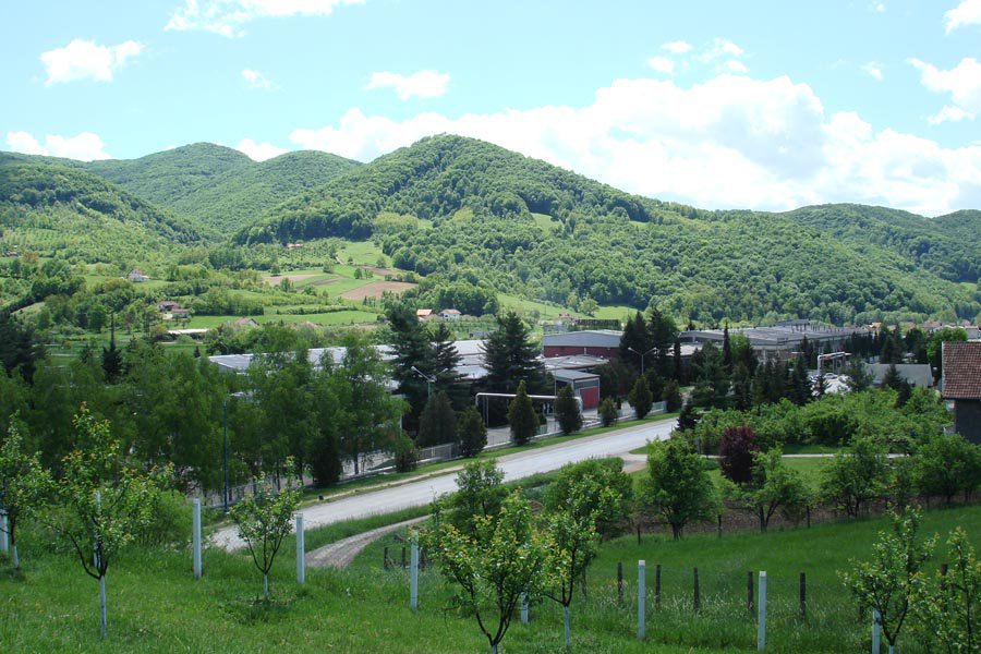 Поглед на јужну индустријску зону Горњег Милановца и планину Вујан у позадини.